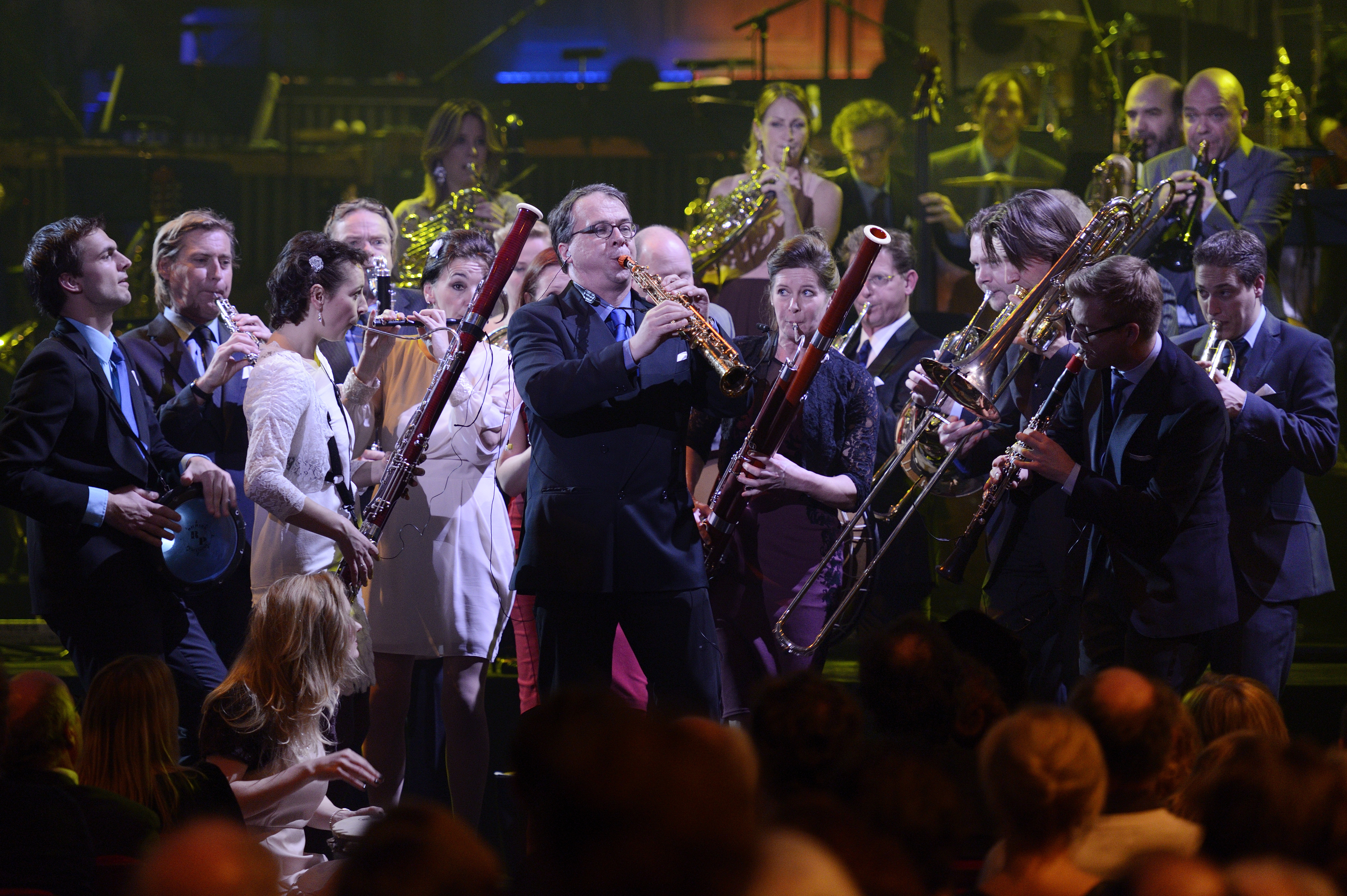 Bart Schneemann en Nederlands Blazers Ensemble. Nieuwjaarsconcert 2013 in het Concertgebouw Amsterdam.